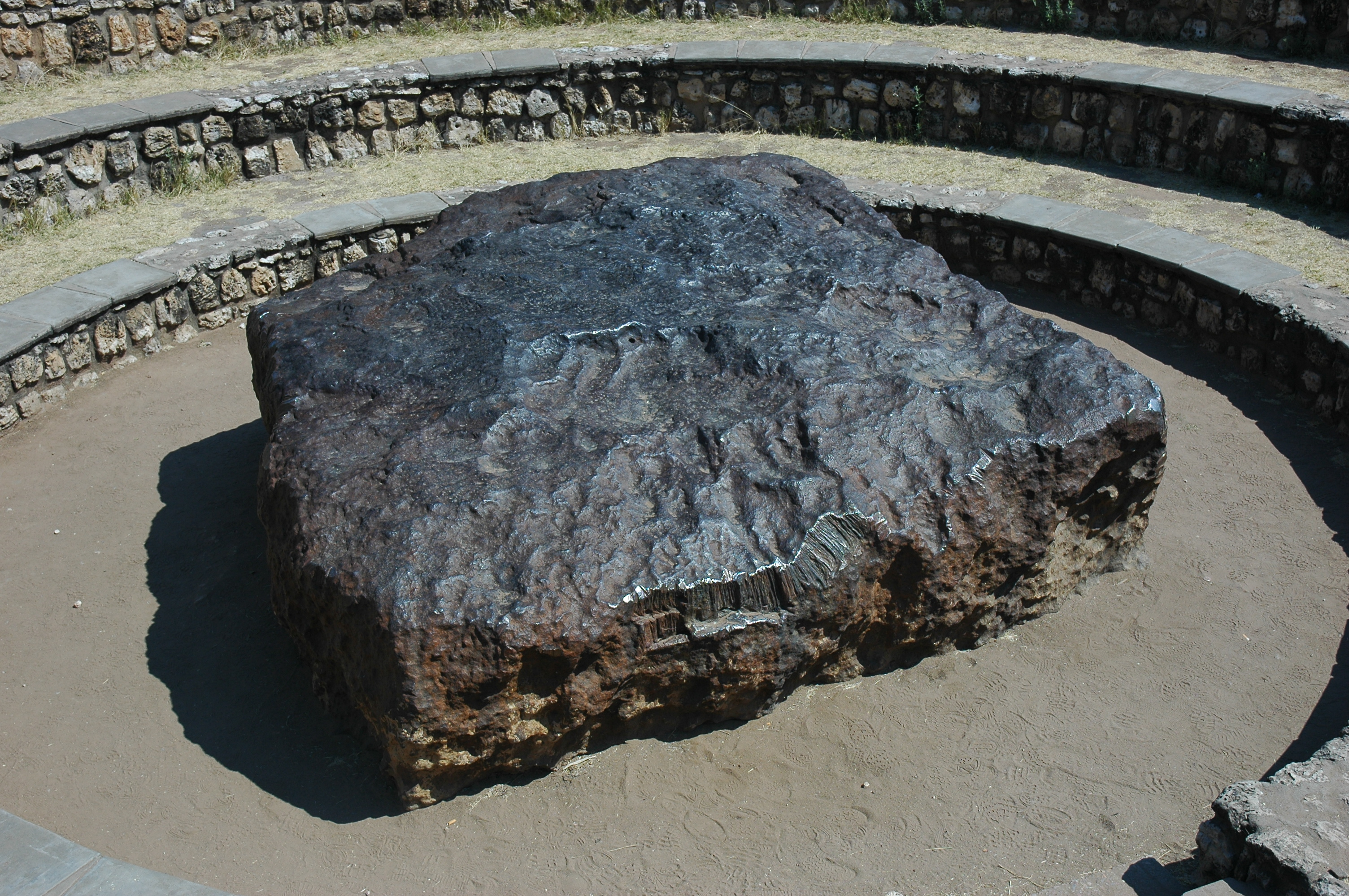 Namibie Météorite Hoba Photographie prise par GIRAUD Patrick